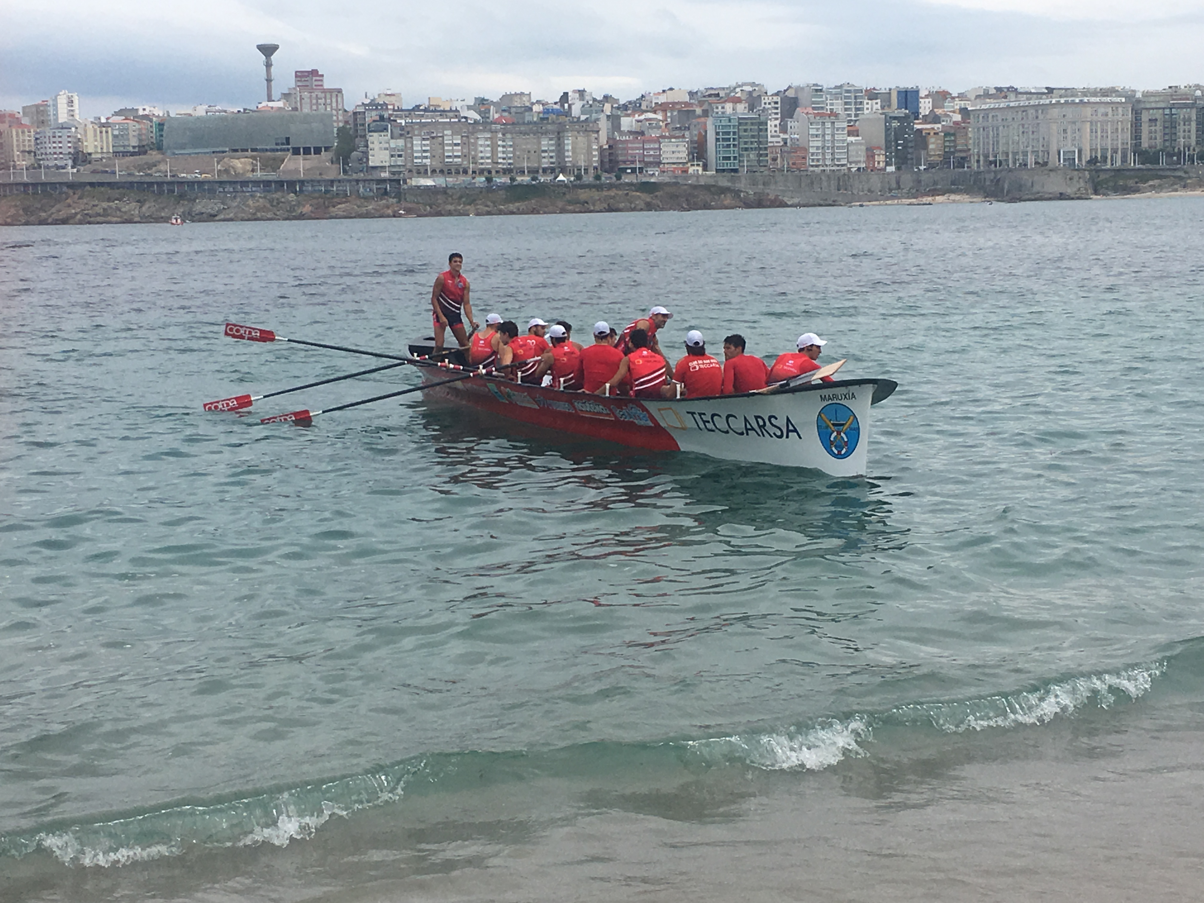 Traiñeira de Bueu na Bandeira Teresa Herrera da Coruña en 2019.